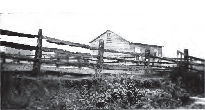 Casa de un trabajador chileno en la propiedad de un alemán cerca de Valdivia, Chile. 1921.